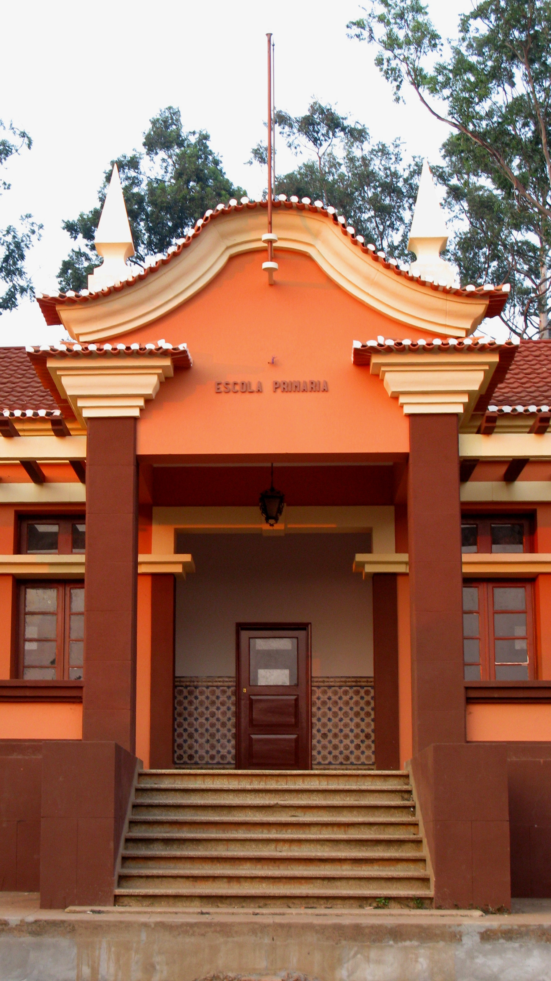 Waku Kungo, Angola